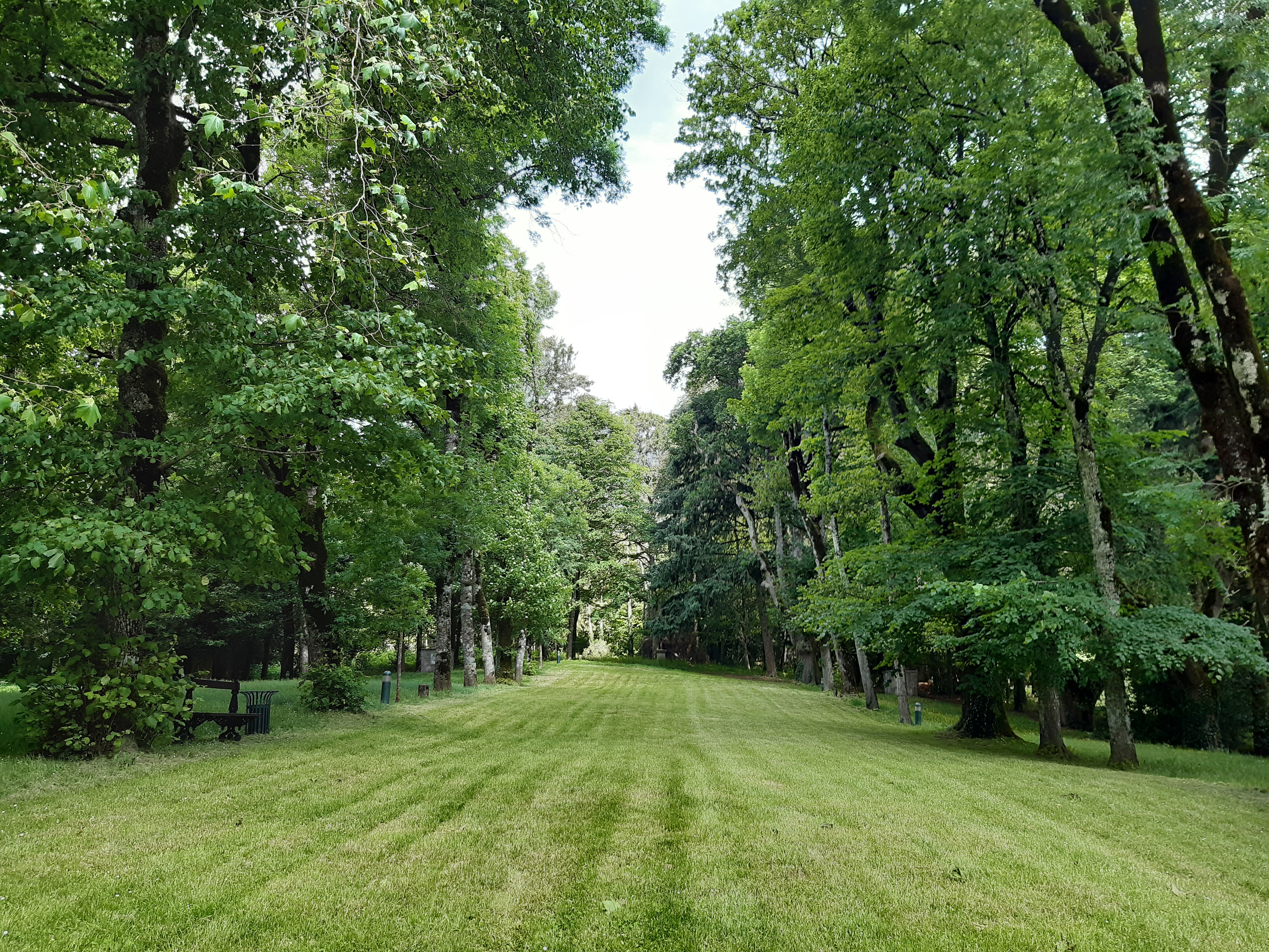 Le bosquet André Le Nôtre à Fontiers-Cabardés (détail), place centrale du village.